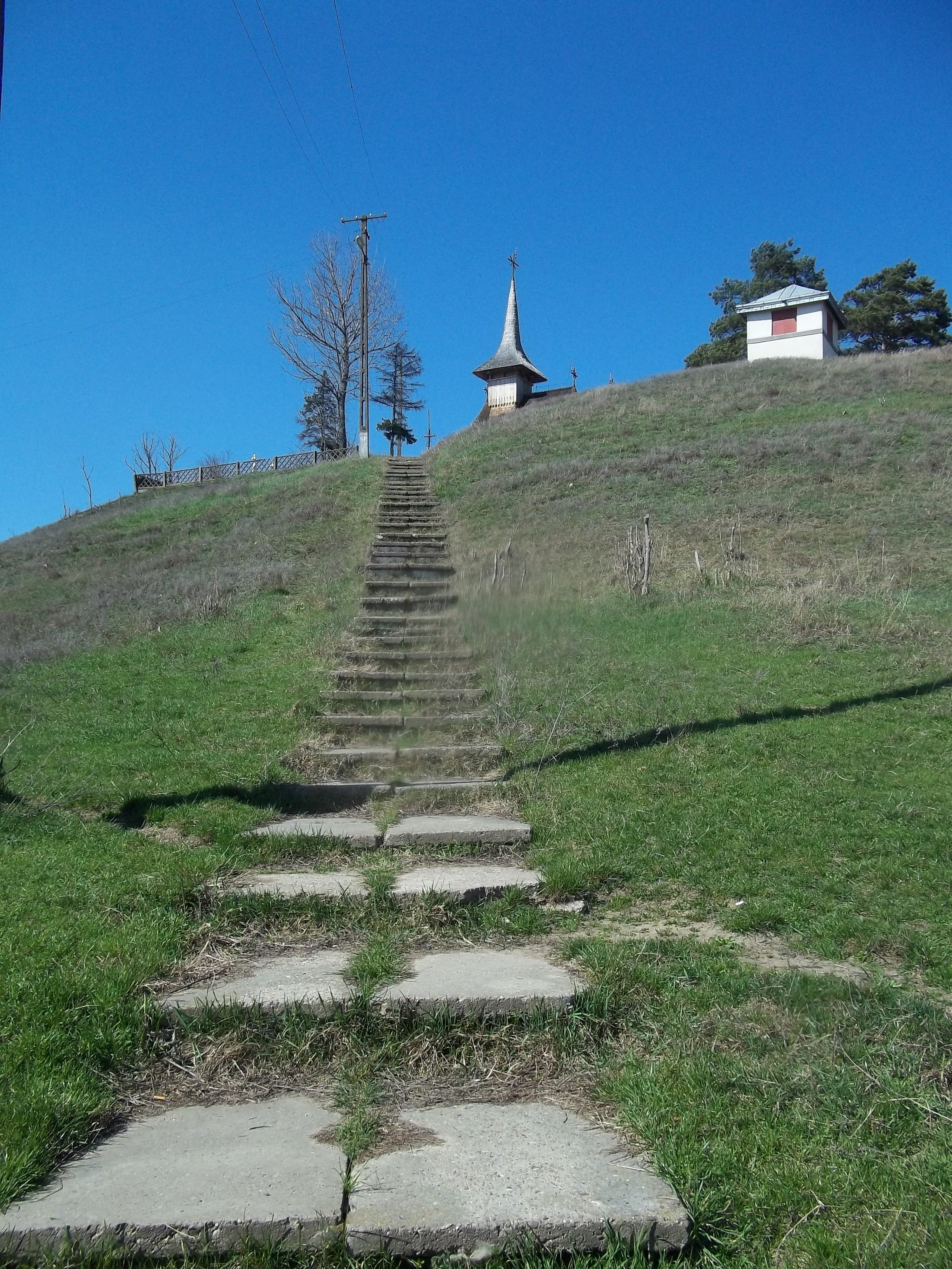 Biserica de lângă mormânt lui Ion Ionescu de la Brad 01